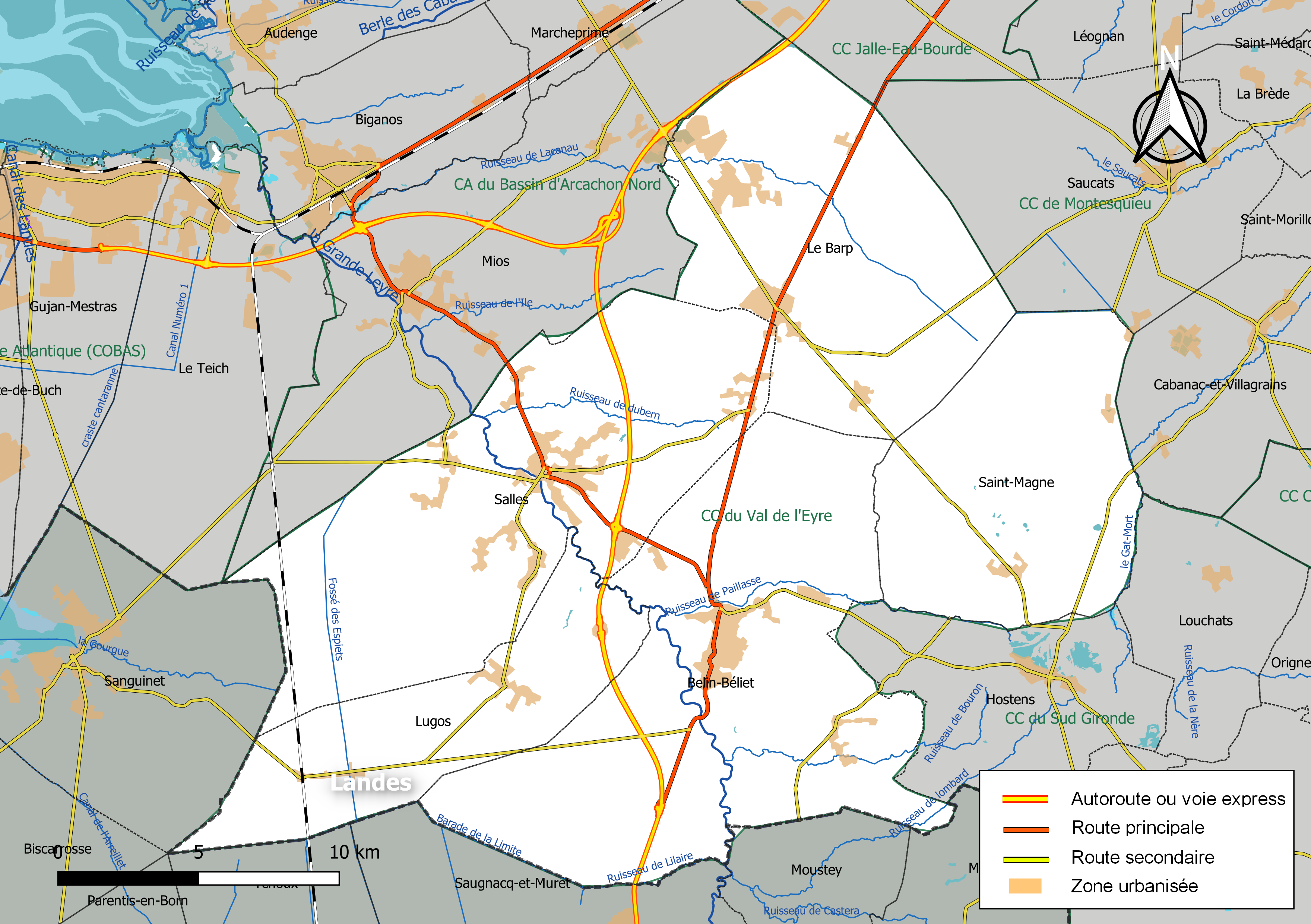 Carte géographique de la Communauté de communes du Val de l'Eyre, département de la Gironde, France. Composition au 1er janvier 2019.